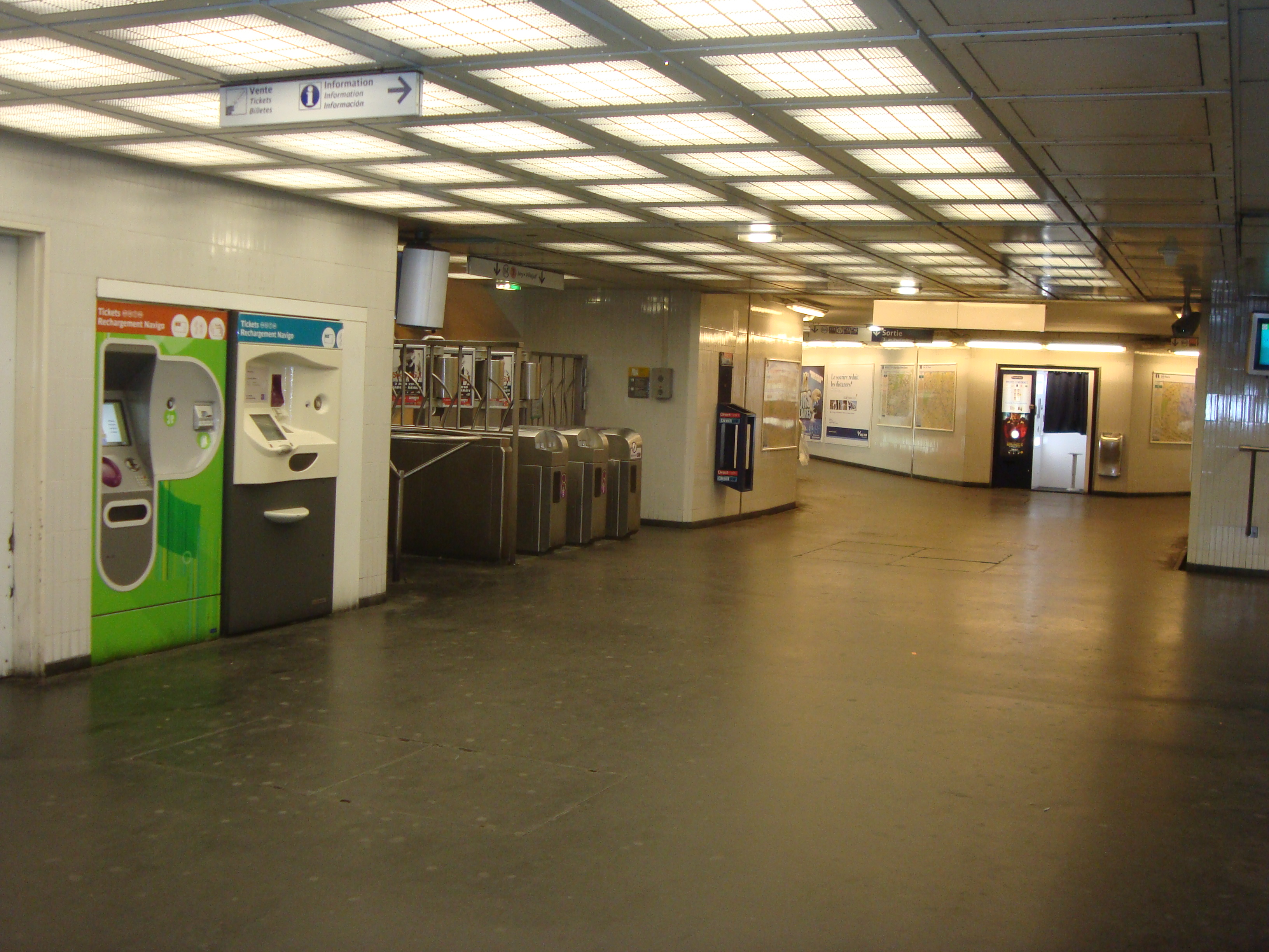 Le couloir devant le point de vente de billets à la station La Courneuve - 8 mai 1945.